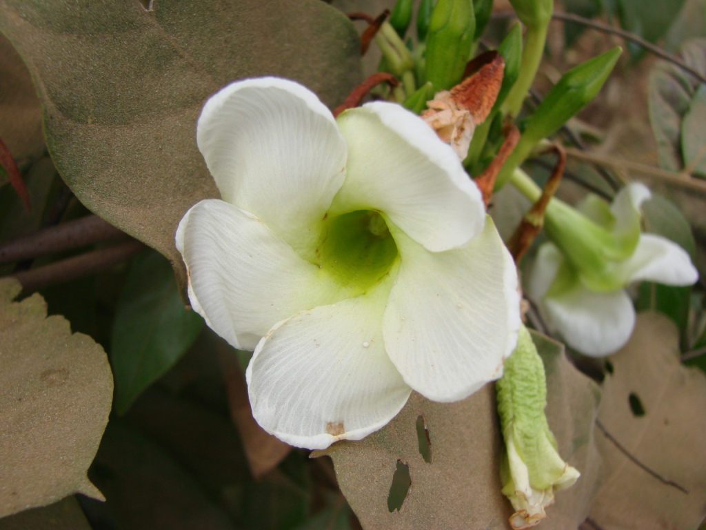 Mandevilla antennacea - APOCYNACEAE - Parque Estadual Serra dos Pirineus - GO - Brasil